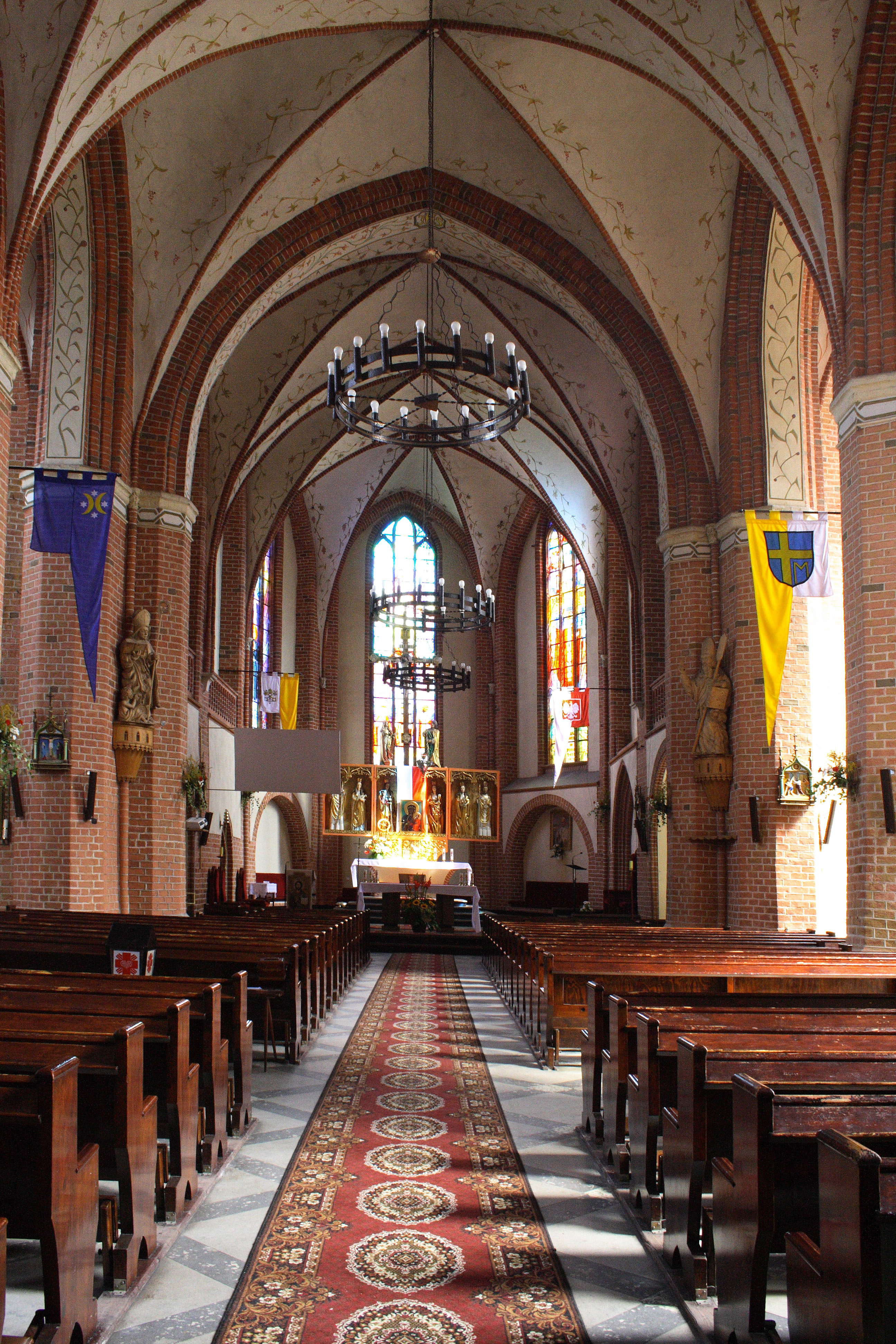 Wnętrze kościoła św. Katarzyny w Goleniowie